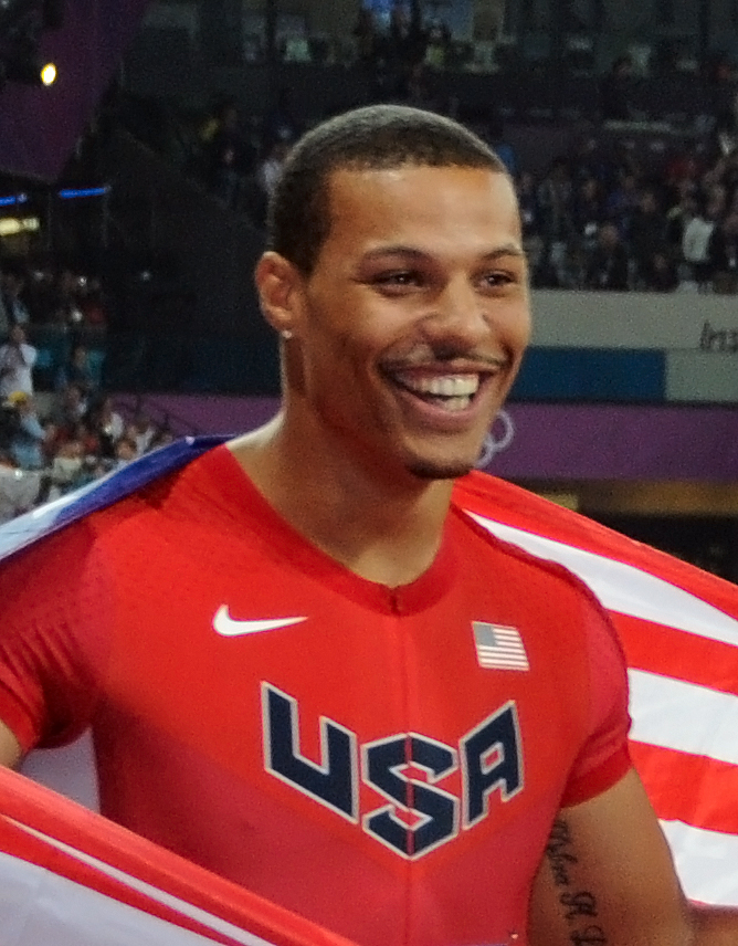 Le sprinteur américain Ryan Bailey